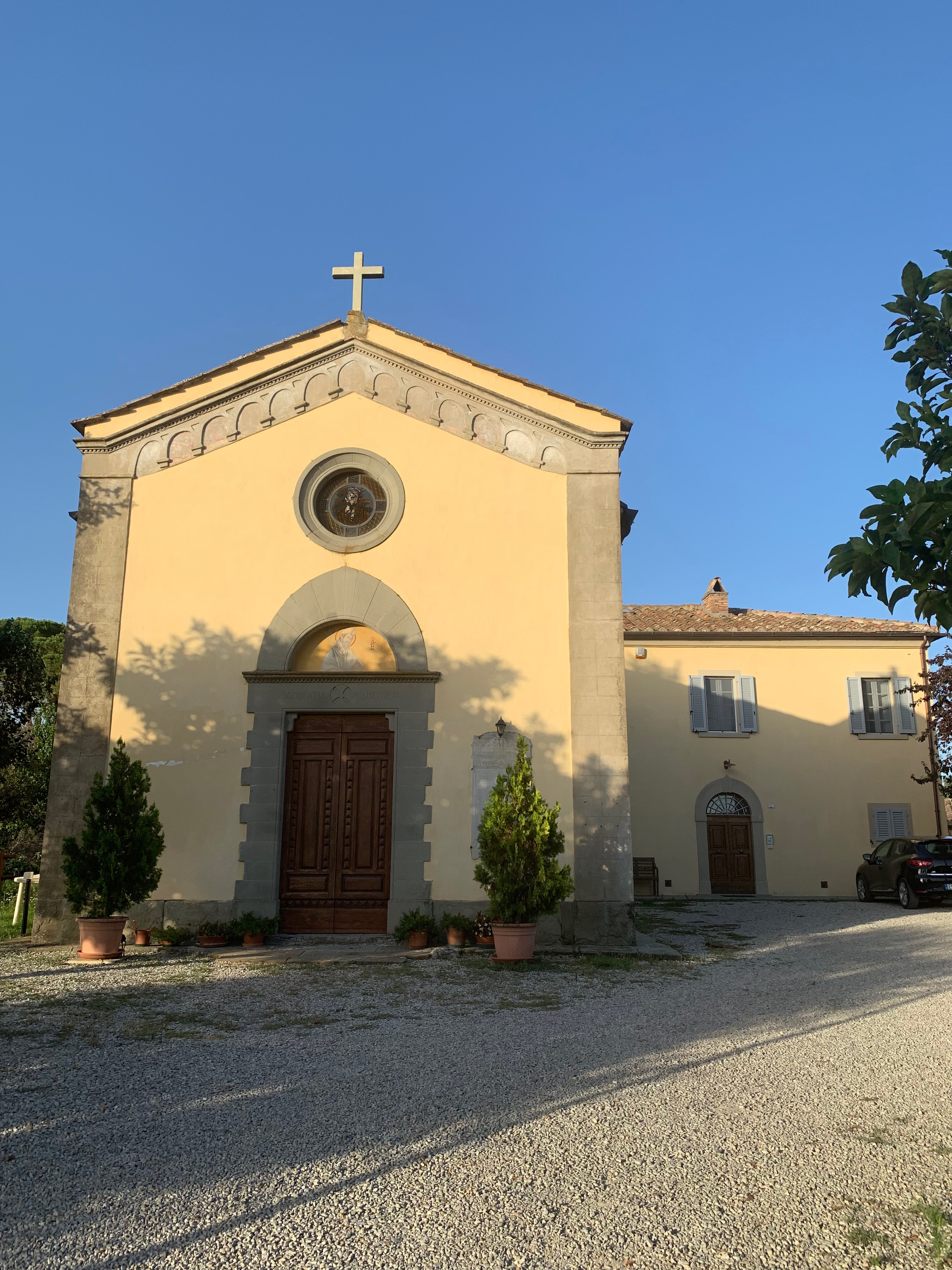 Chiesa di Monsigliolo